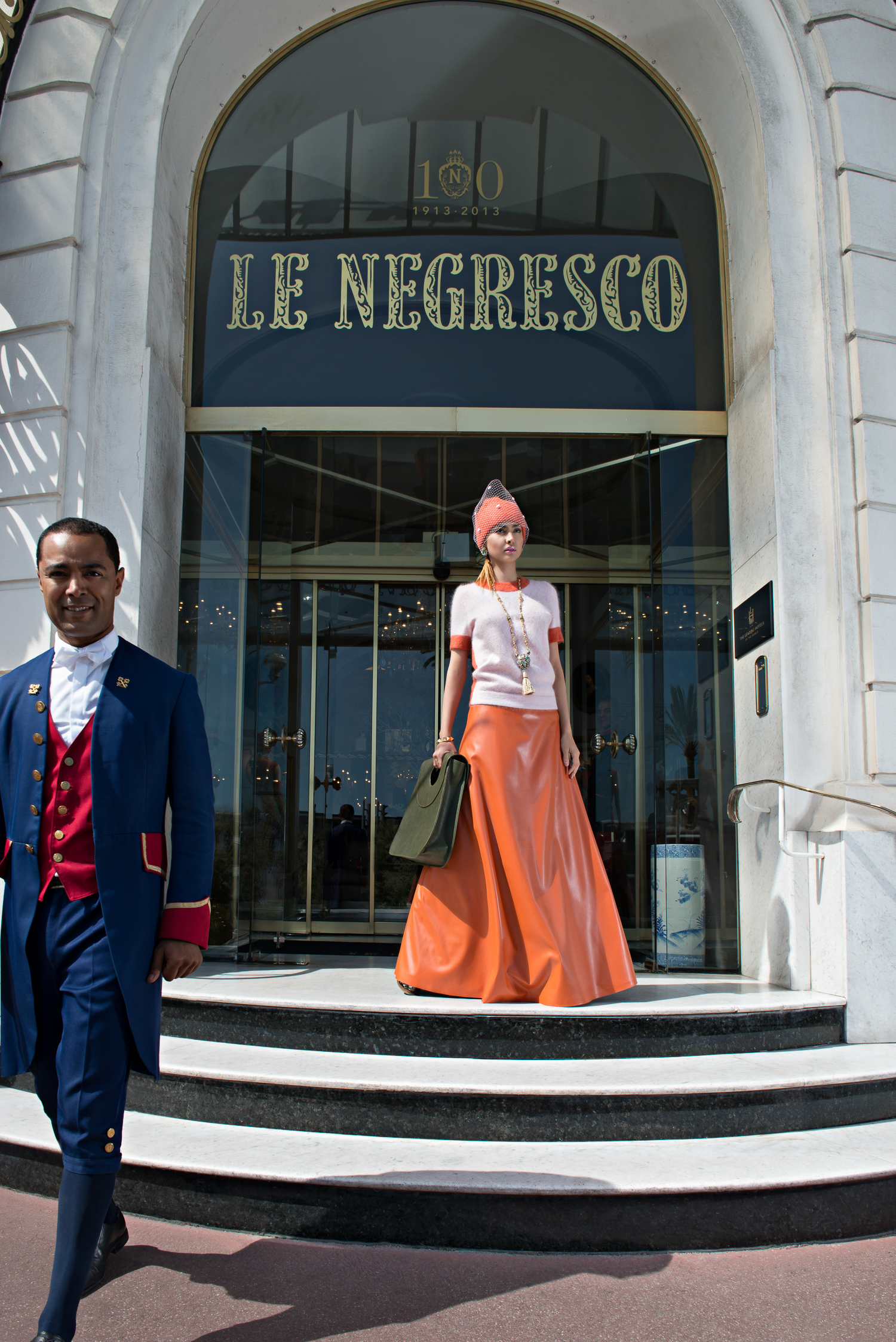 L'entrée de L'Hôtel Negresco Nice photographiée par Gil Zetbase en 2015